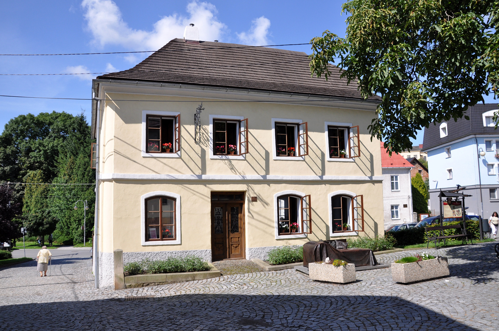 Geburtshaus von Sigmund Freud, heute Museum